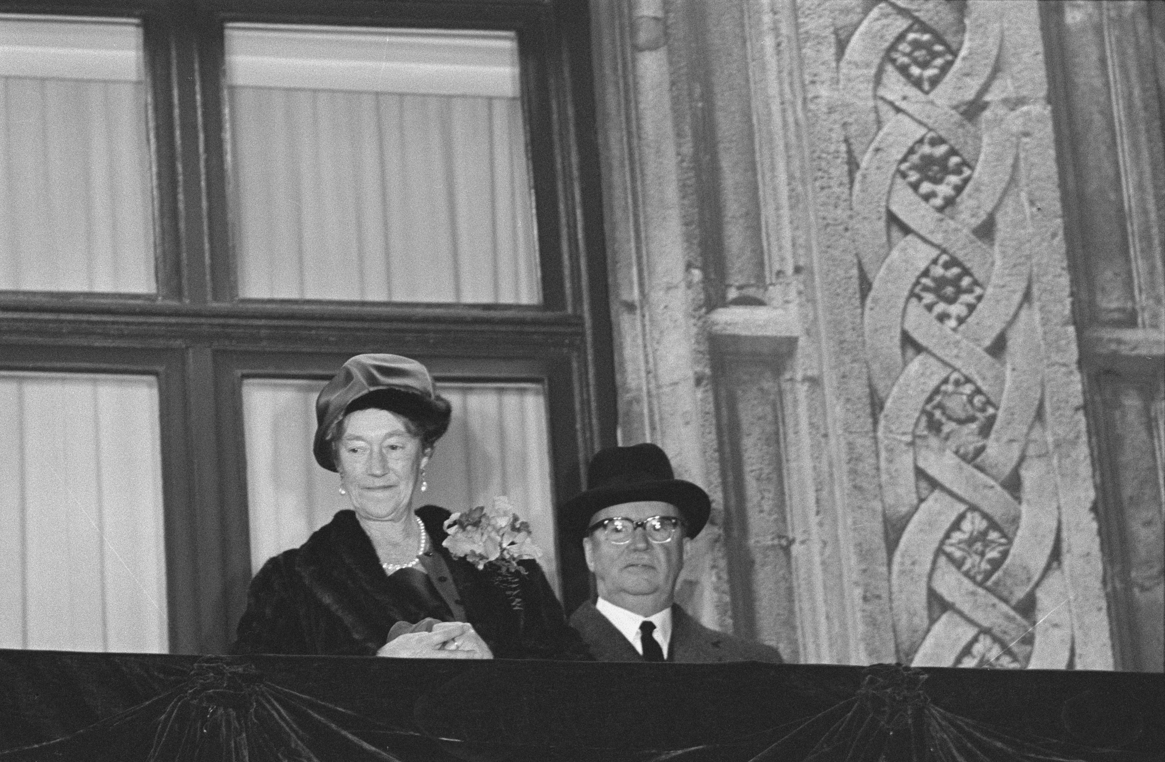 Collectie / Archief : Fotocollectie Anefo Reportage / Serie : [ onbekend ] Beschrijving : De abdicatie en opvolging in Luxemburg, op het balkon van het Paleis Groothertogin Charlotte en echtgenoot die afscheid nemen van hun volk Datum : 11 november 1964 Locatie : Luxemburg Trefwoorden : AFSCHEID, ECHTGENOTEN, abdicaties, paleizen Persoonsnaam : Charlotte, groothertogin van Luxemburg Fotograaf : Nijs, Jac. de / Anefo Auteursrechthebbende : Nationaal Archief Materiaalsoort : Negatief (zwart/wit) Nummer archiefinventaris : bekijk toegang 2.24.01.05 Bestanddeelnummer : 934-6443